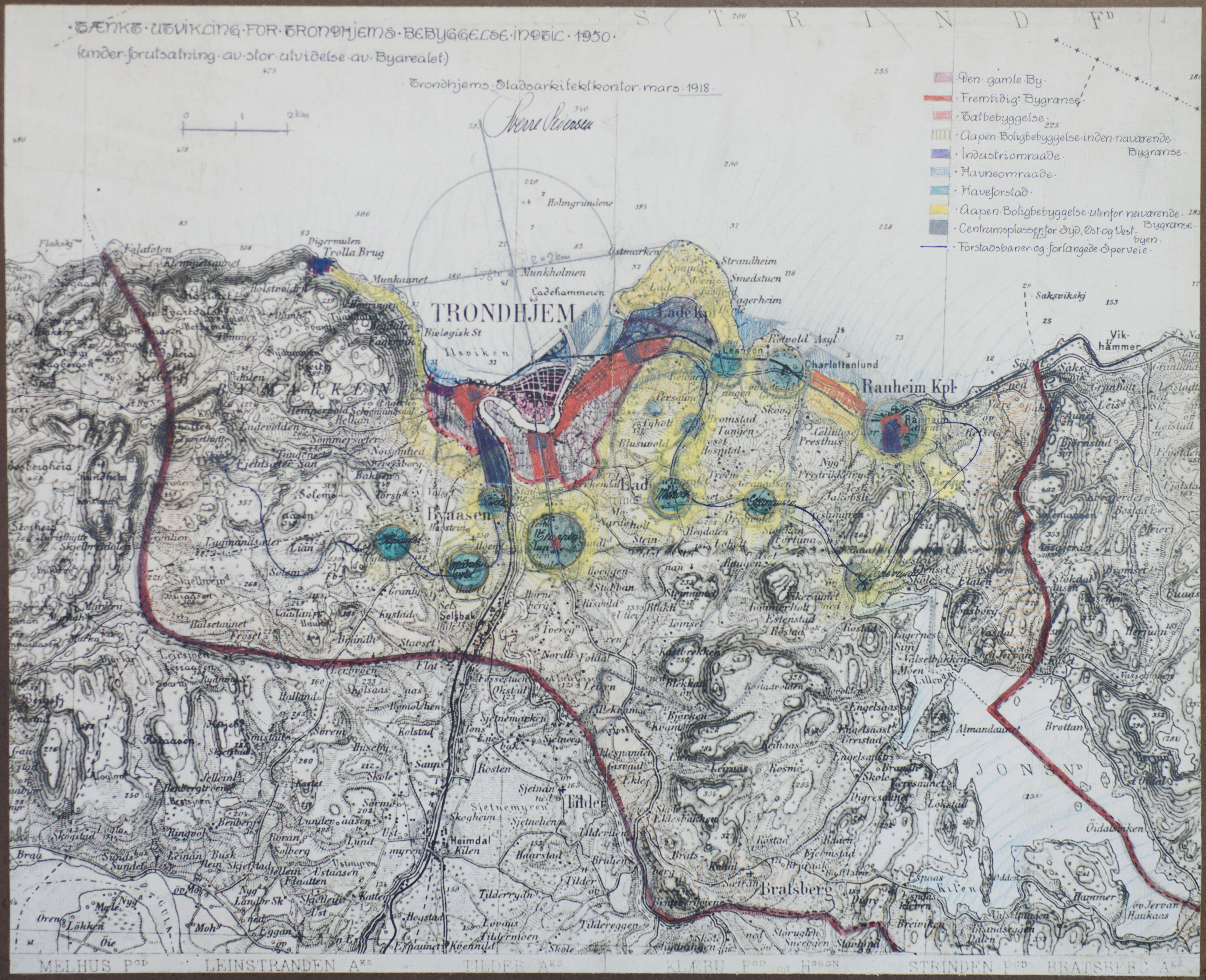 Stadsarkitekt Sverre Pedersens utviklingsplan for Trondhjem (=Trondheim) fra mars 1918